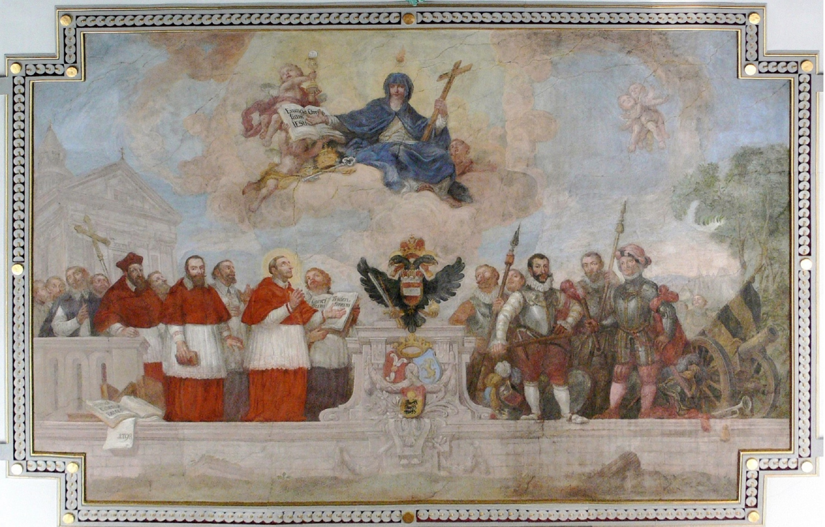 Hohenems, Vorarlberg: Pfarrkirche St. Karl Borromäus Fresko von Andreas Brugger, 1798 Allegorie des Konzils von Trient